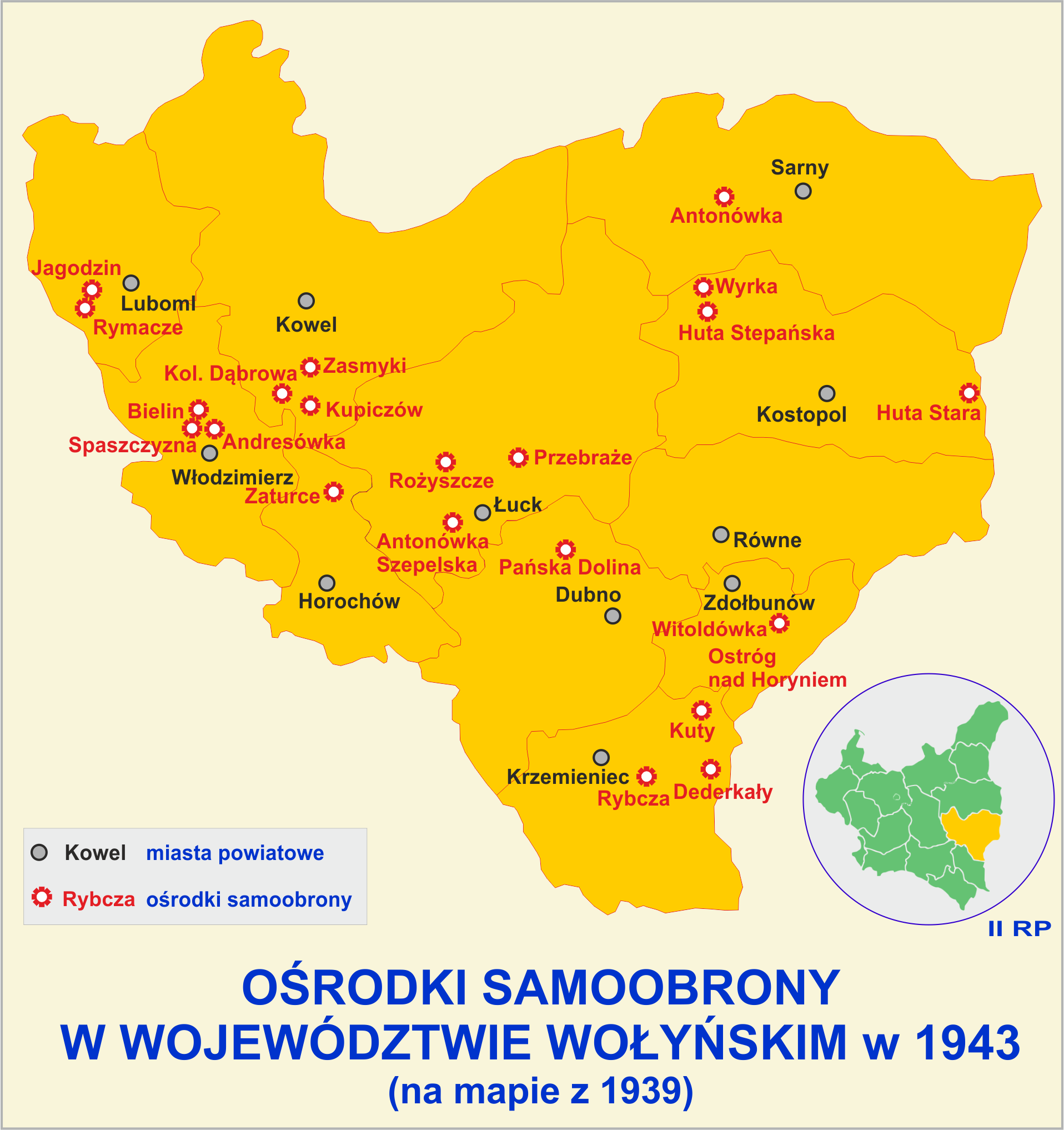 Ośrodki samoobrony w województwie wołyńskim w 1943